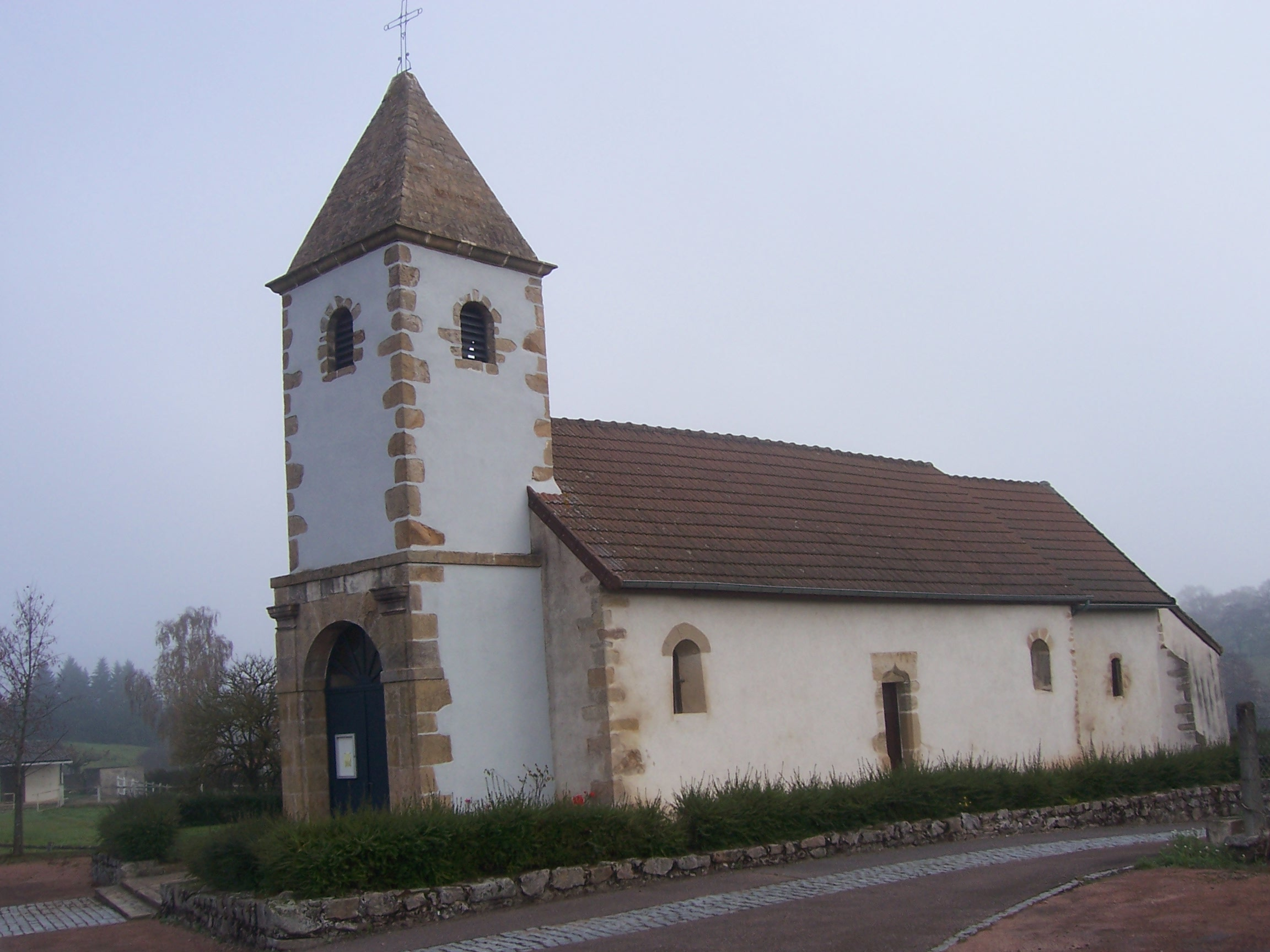 Eglise de Saint-Julien-sur-Dheune